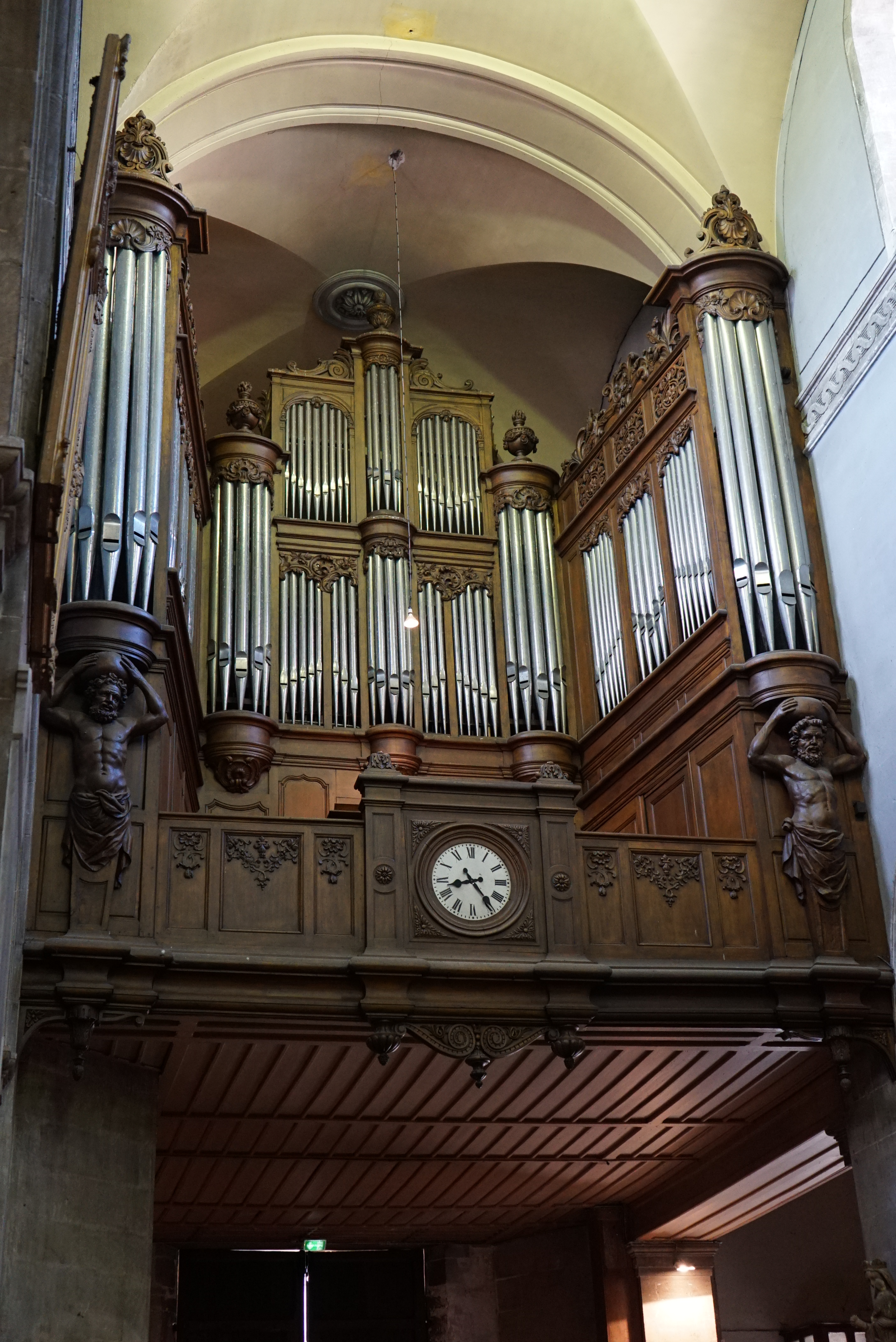 Intérieur de Notre-Dame-de-l'Assomption de Saint-Dizier; orgue d'Aristide Cavaillé-Coll en 1862 réutilisant des éléments du buffet de l'orgue de Jacques Cochu (1740-1750); restauré en 1988 par Laurent Plet.